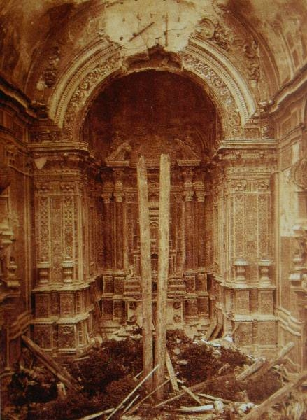 Le rovine della Chiesa di San Gregorio a Messina, che era stata progettata nel 1702 da Filippo Juvarra, dopo il terremoto del 1908.